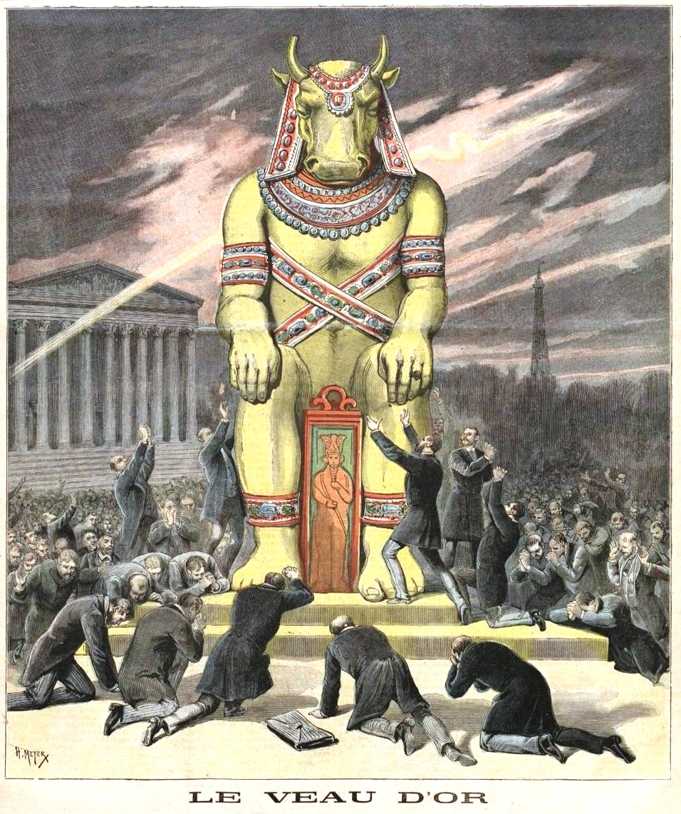 "Le Veau d'or" (allégorie du scandale de Panama) - Détail de la gravure.